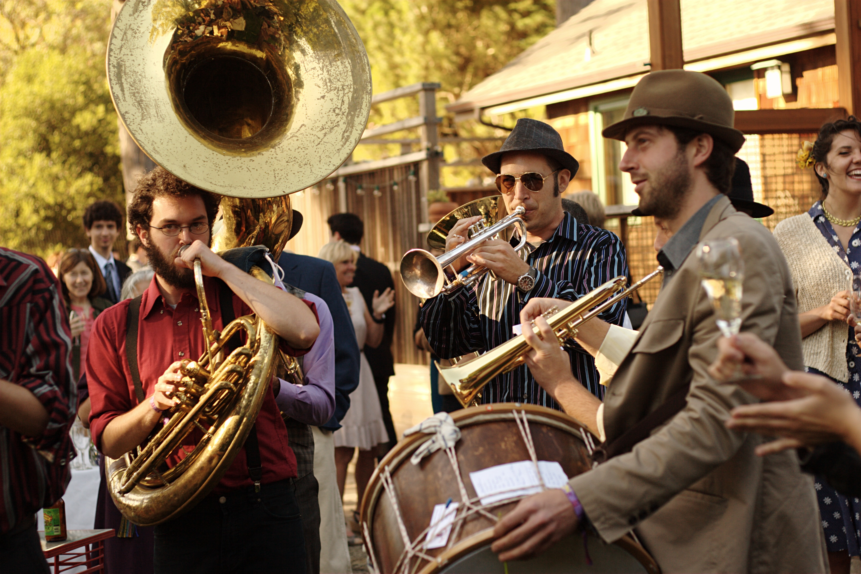 Balkan brass band